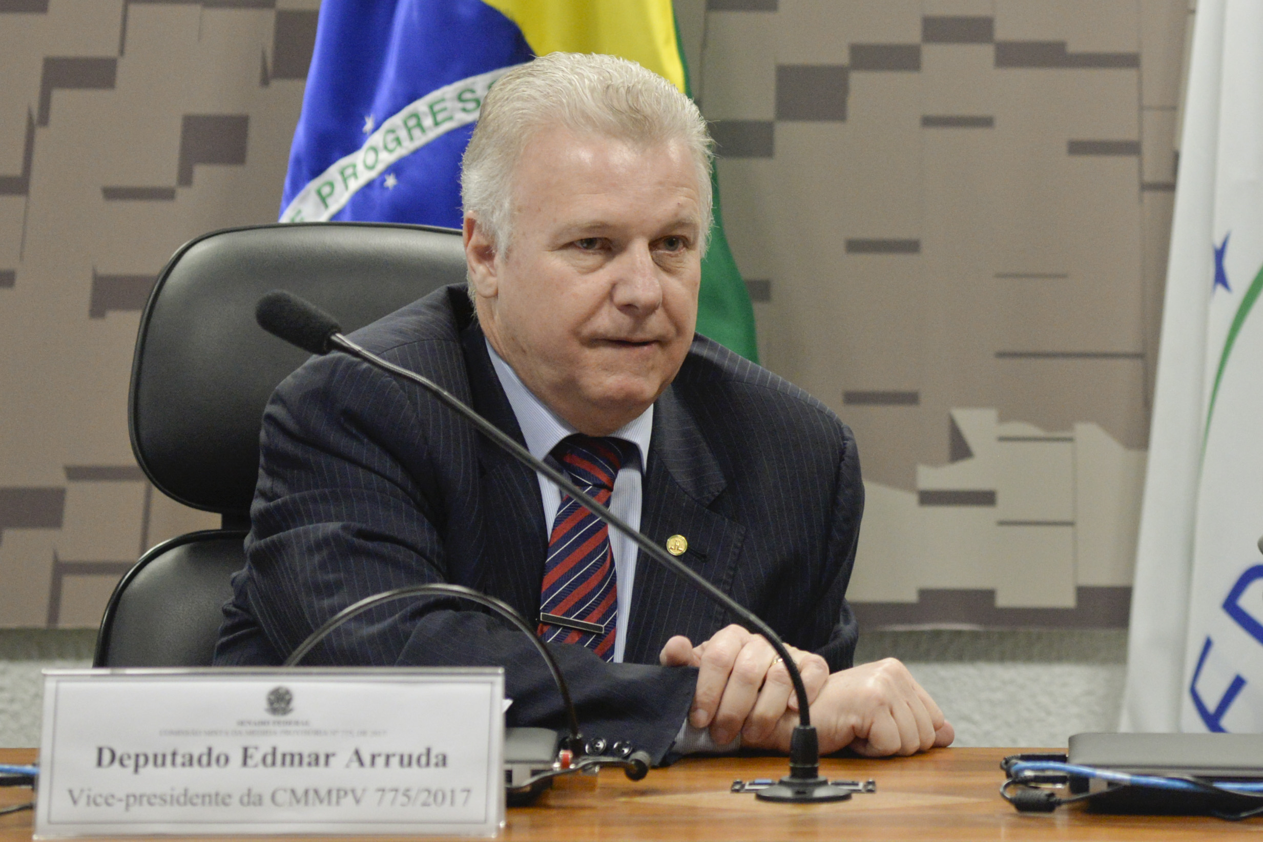 Comissão Mista da Medida Provisória (CMMPV) nº 775, de 2017, que altera a Lei nº 12.810, de 15 de maio de 2013, para dispor sobre a constituição de gravames e ônus sobre ativos financeiros e valores mobiliários objeto de registro ou de depósito centralizado, realiza reunião deliberativa para apreciação de relatório. À mesa, vice-presidente da CMMPV 775/2017, deputado Edmar Arruda (PSD-PR). Foto: Jefferson Rudy/Agência Senado